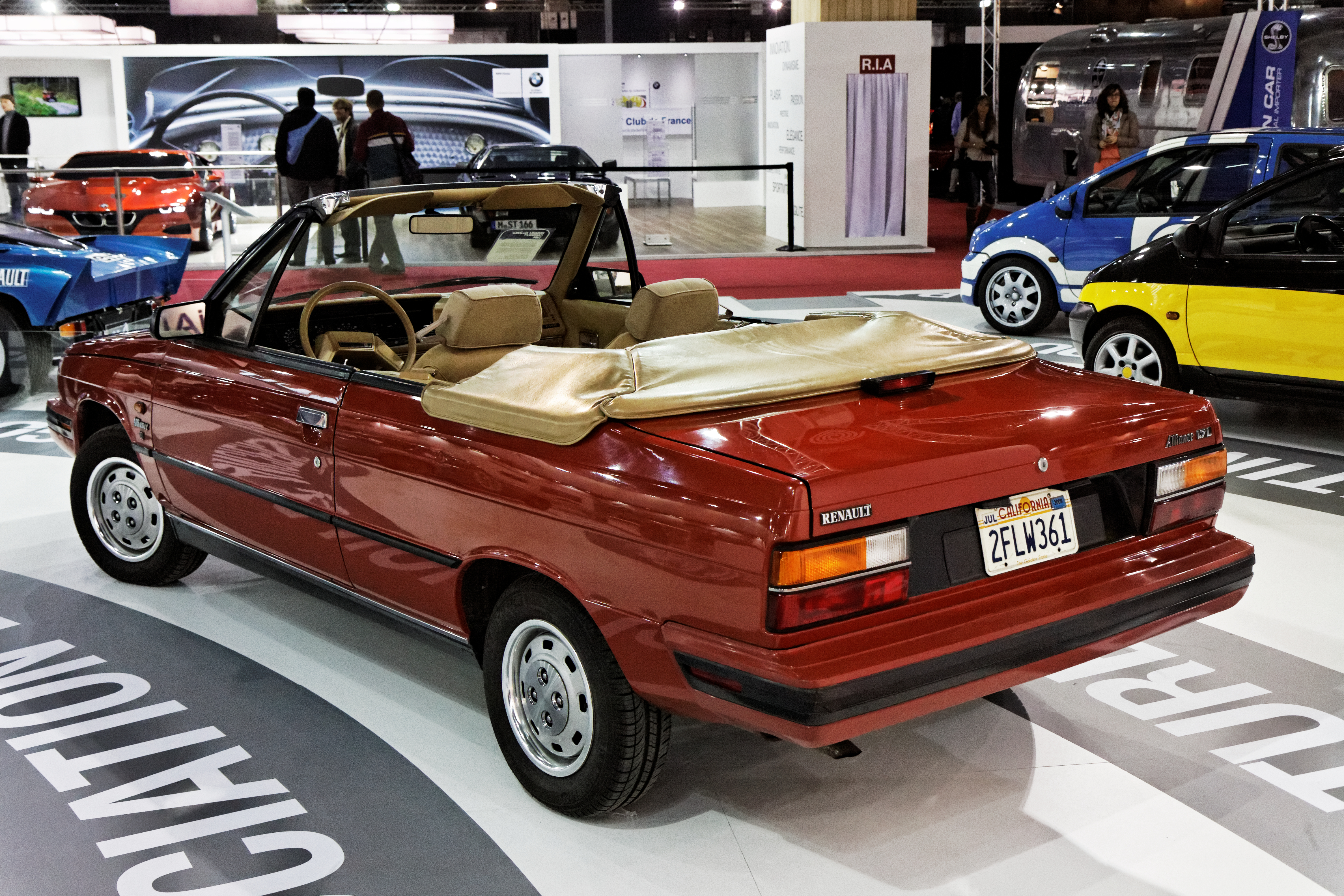 Une Renault Alliance cabriolet présentée lors du salon Retromobile 2013.